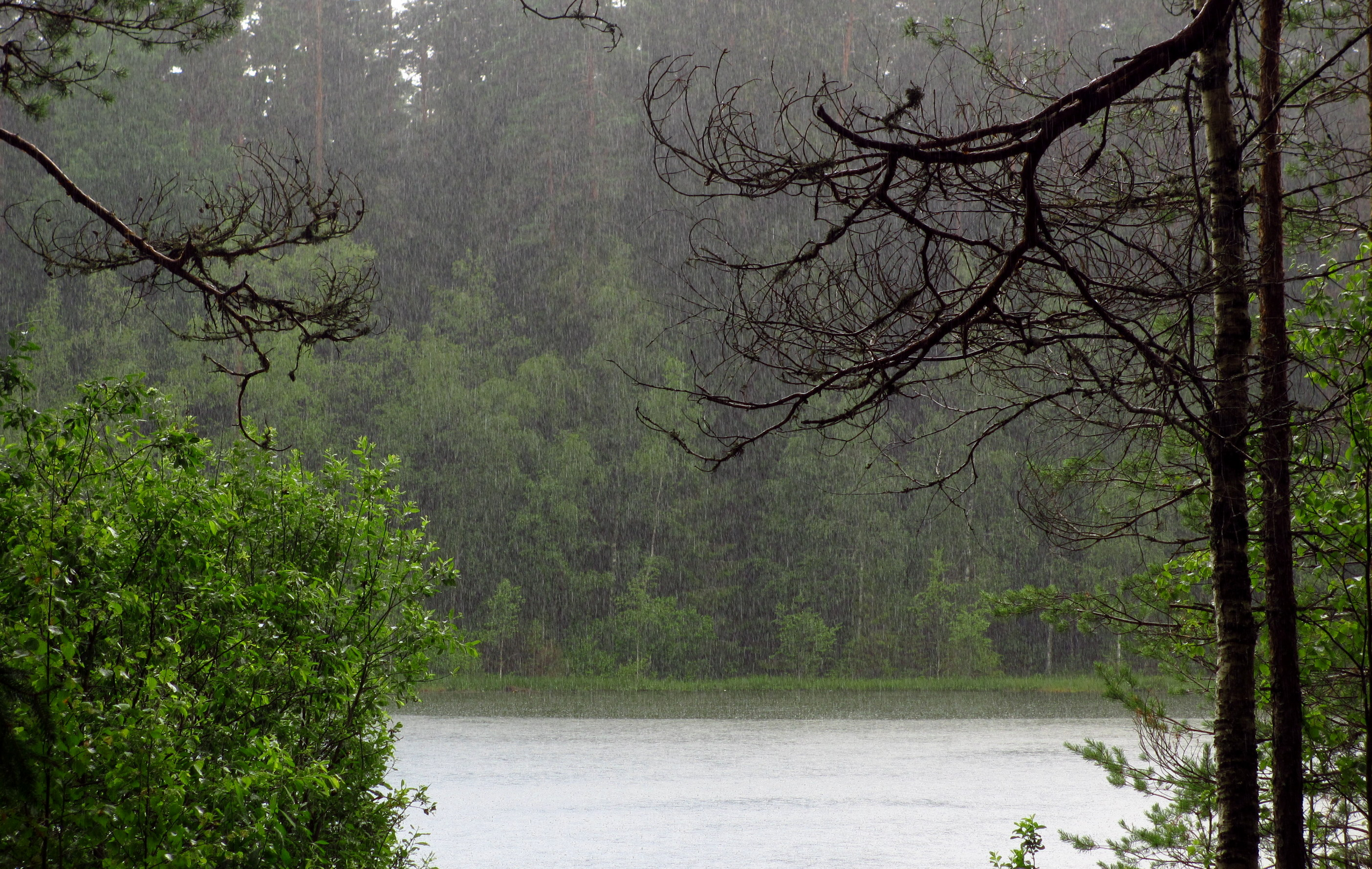 Vihmasadu Vaiksel järvel Elva-Vitipalu MKA-l